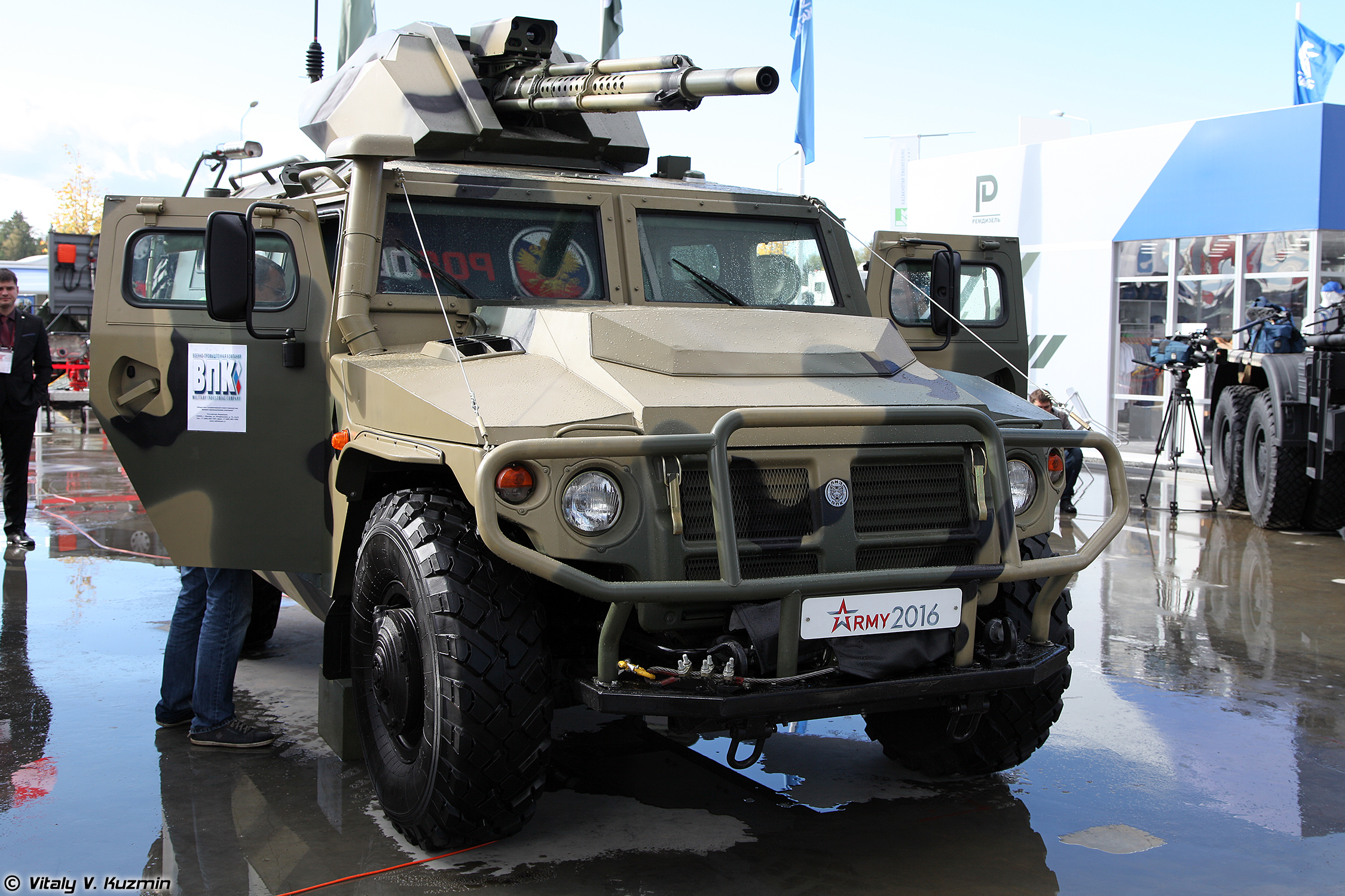 Опытный образец специального роботизированного автомобиля с дистанционно управляемым боевым модулем с 30-мм автоматической пушкой на базе АCН 233115 Тигр-М СПН (Prototype of armored unmanned ground vehicle with 30-mm remote weapon station based on ASN 233115 Tigr-M SPN armored vehicle)